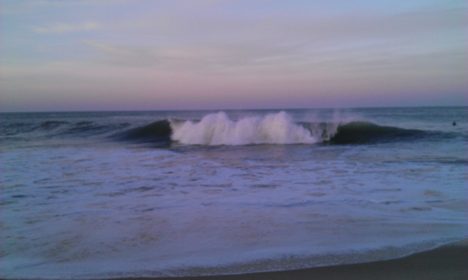 lever de soleil sur la mer au large du phare